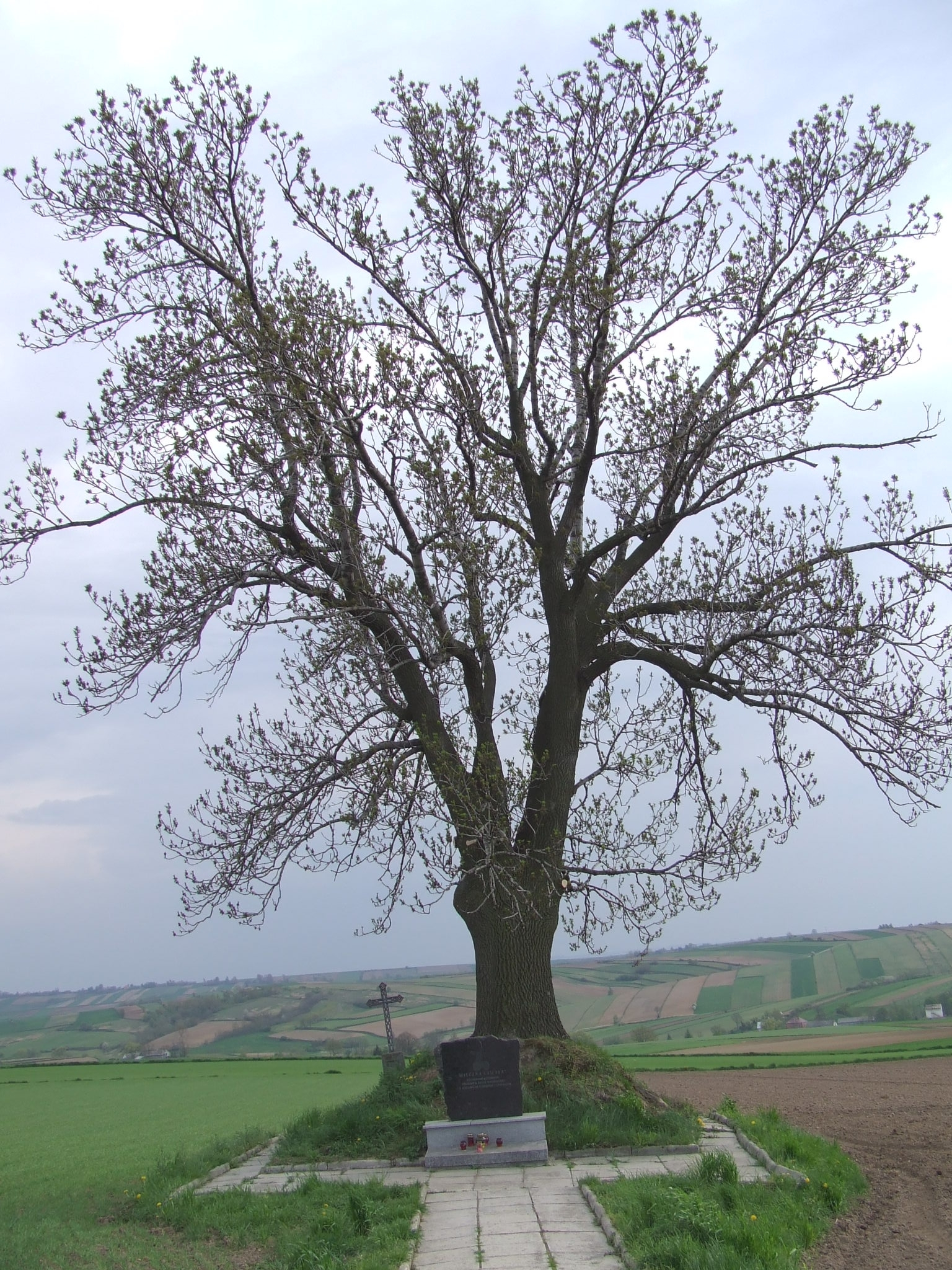 the grave of kosynierzy in Dziemięrzyce near Racławice/mogiła kosynierów w Dziemięrzycach k. Racławic